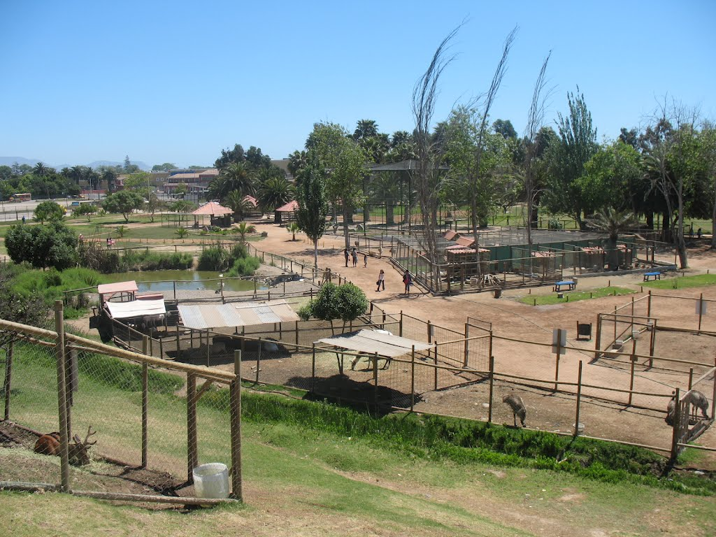 La Serena, Chile